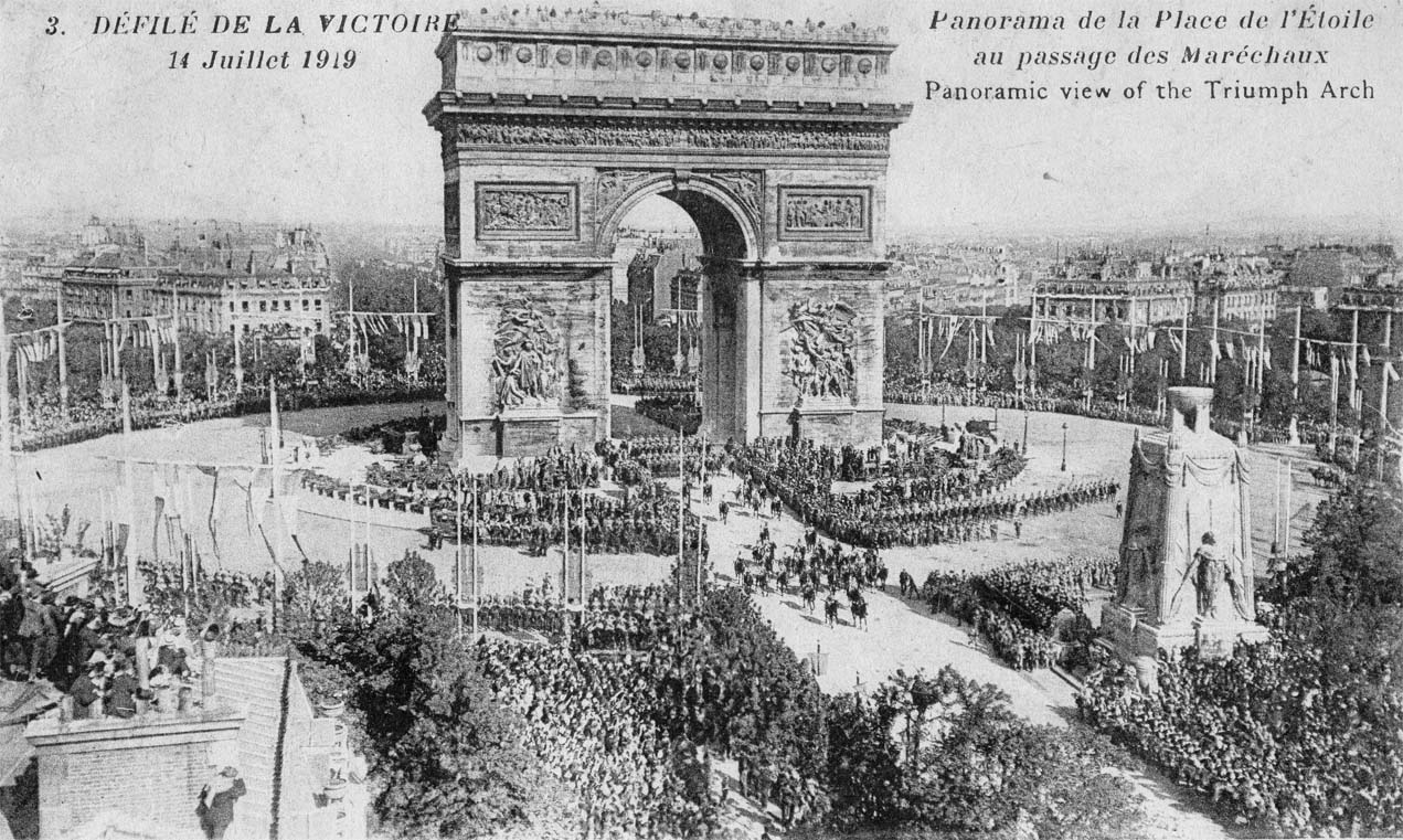 carte postale du défilé de la victoire le 14 juillet 1919, place de l'Étoile, à Paris.